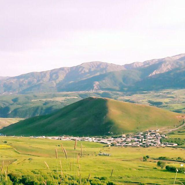 نمایی دور از روستای هنگ آباد.